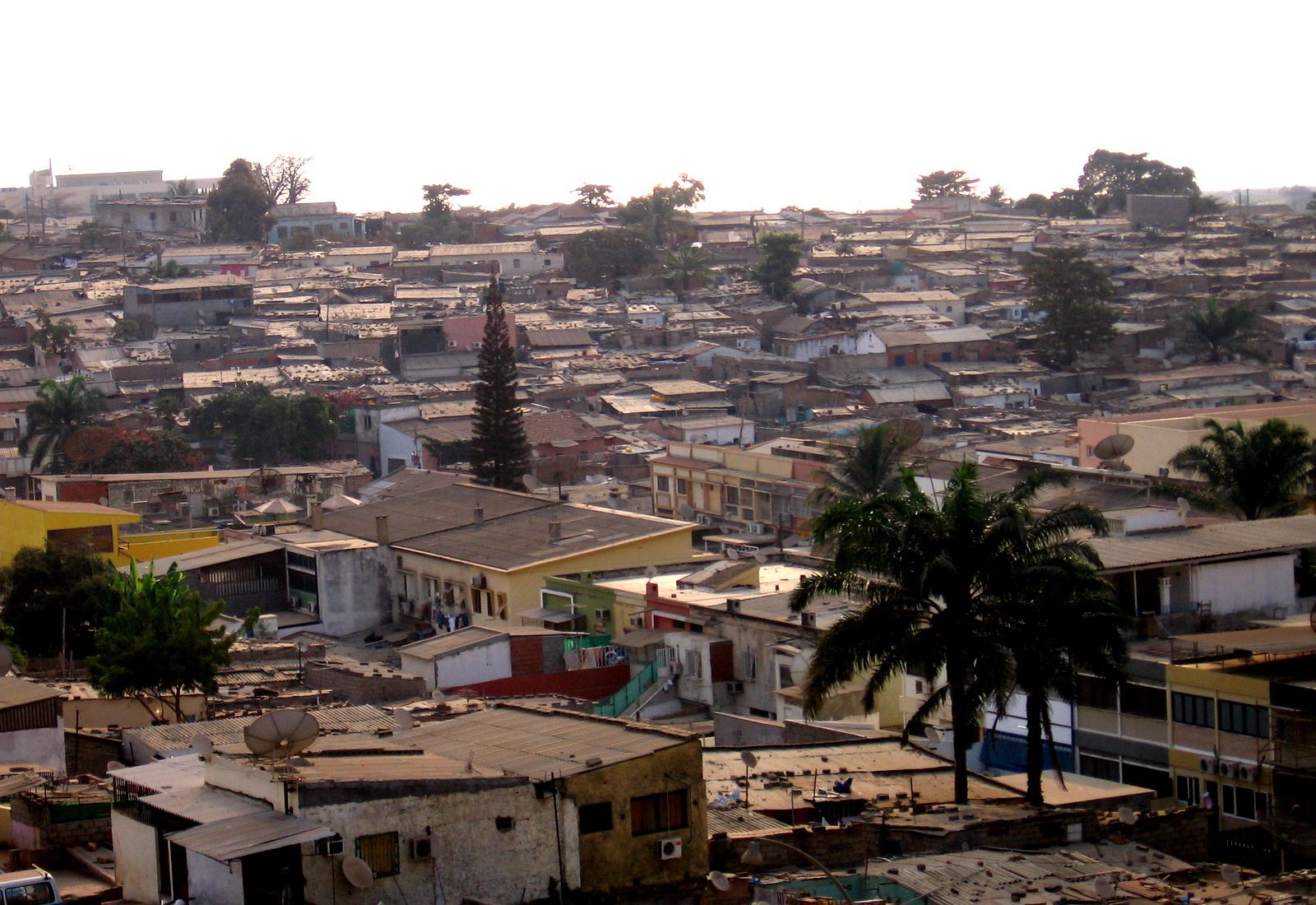 Maianga, suburb of Luanda, Angola (2007)